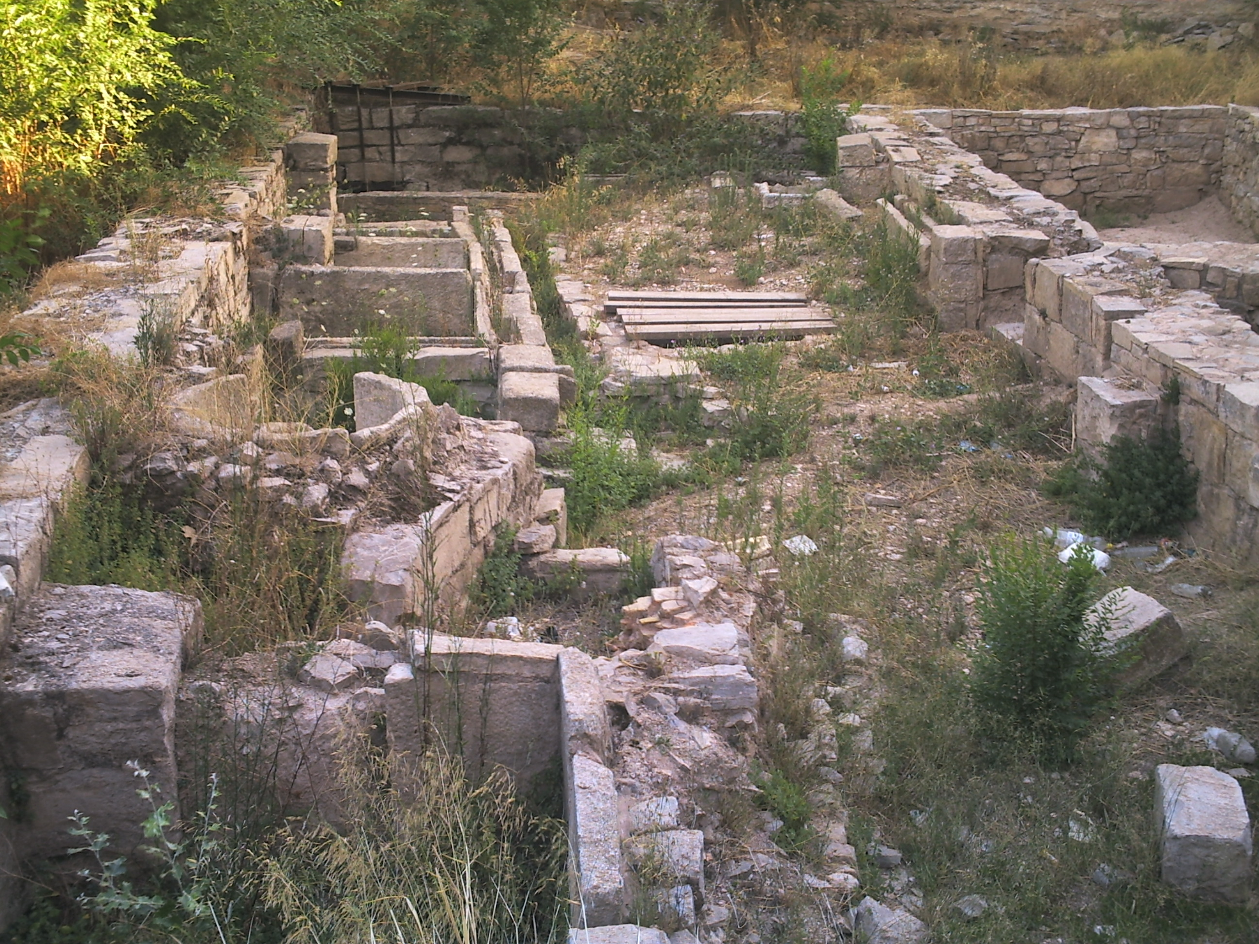 Ruinas de la adoberia judía del Molino de Codina (siglos XVI i XVII)